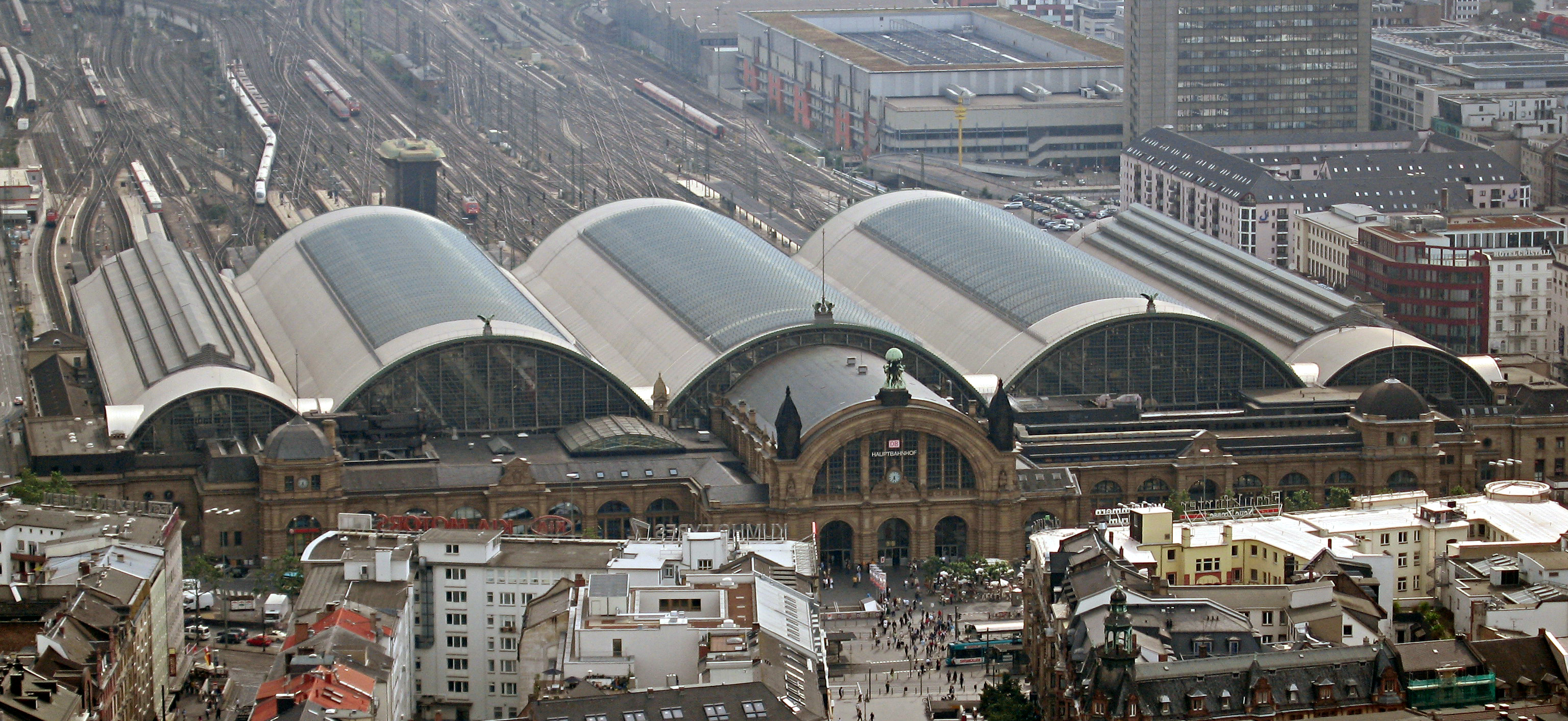 Frankfurt am Main, Hauptbahnhof, vom Dach der Europäischen Zentralbank aus gesehen